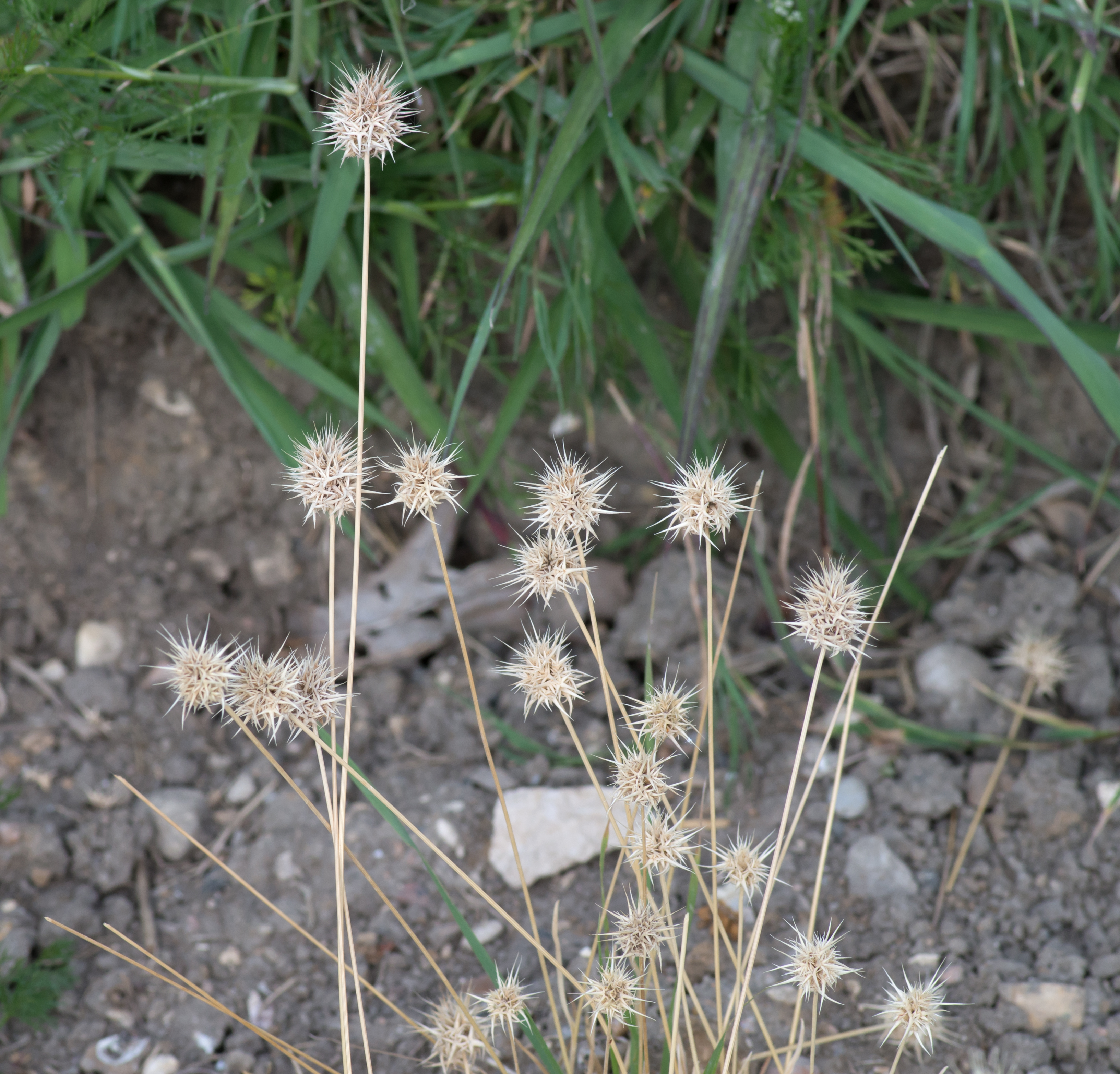 Echinaria capitata - Jardin des Plantes